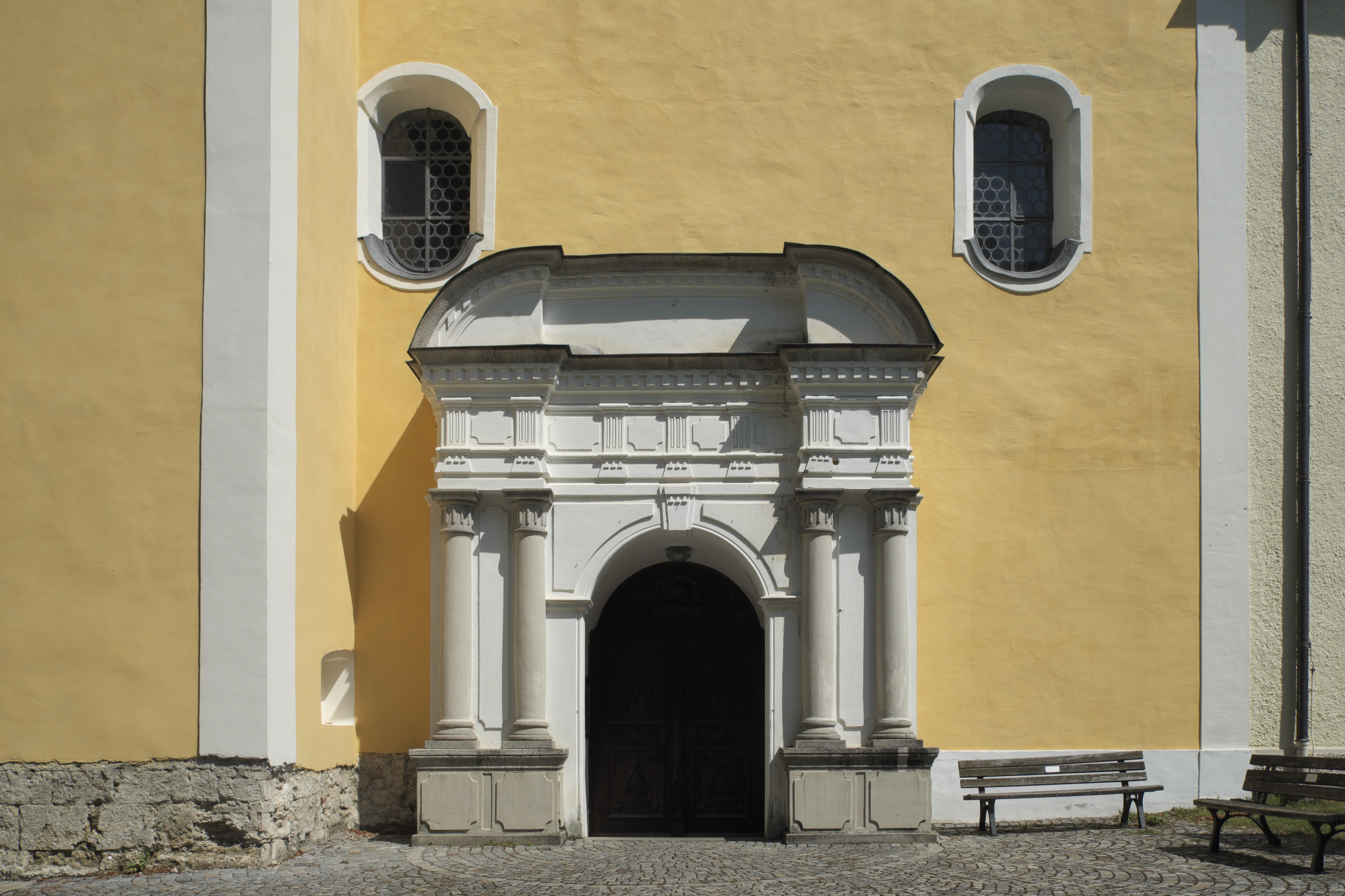 Katholische Pfarrkirche St. Martin, ehemalige Augustinerchorherrenstiftskirche, in Bernried am Starnberger See im Landkreis Weilheim-Schongau (Bayern/Deutschland)